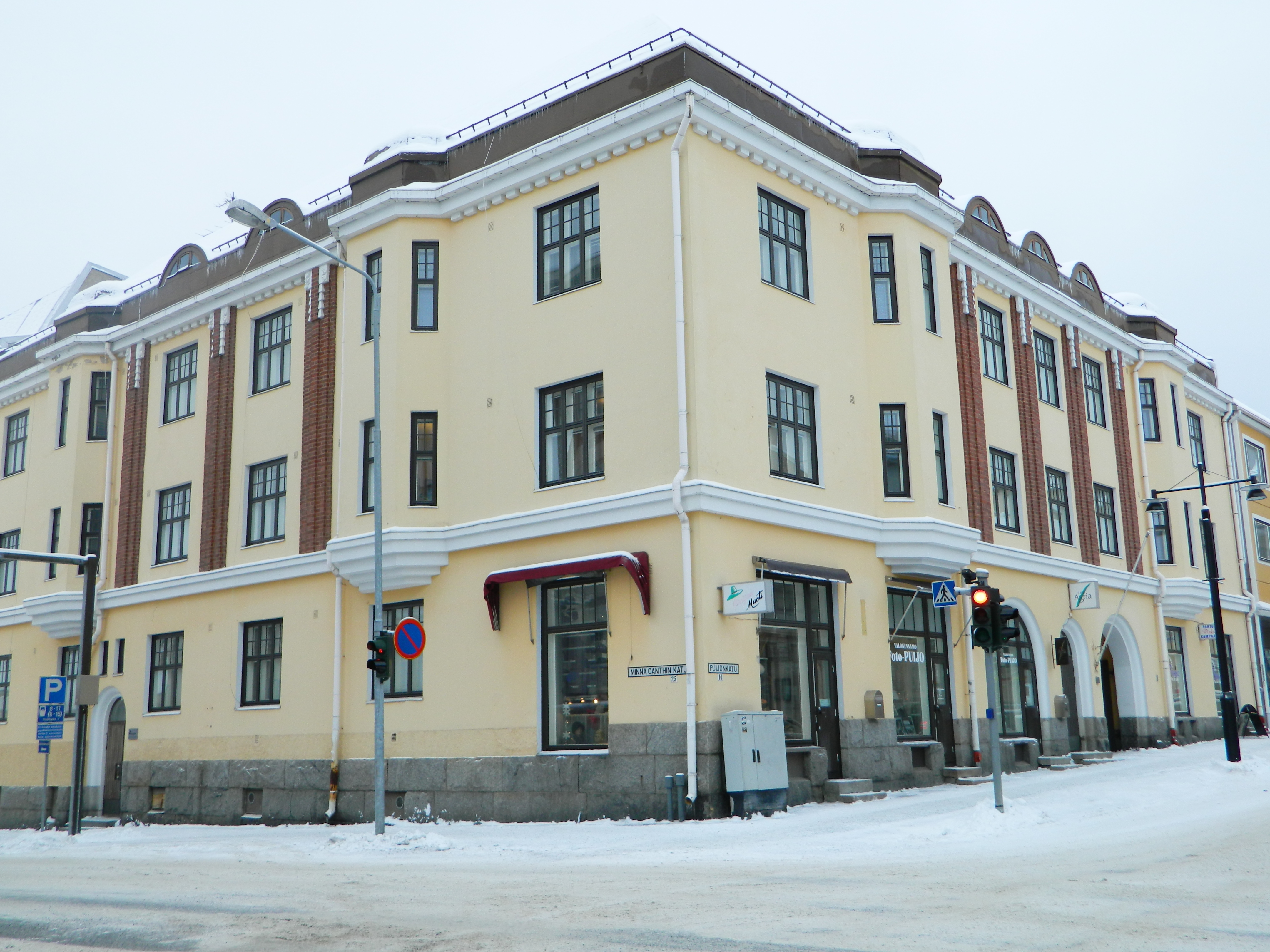 Puijonkatu 14, Kuopio